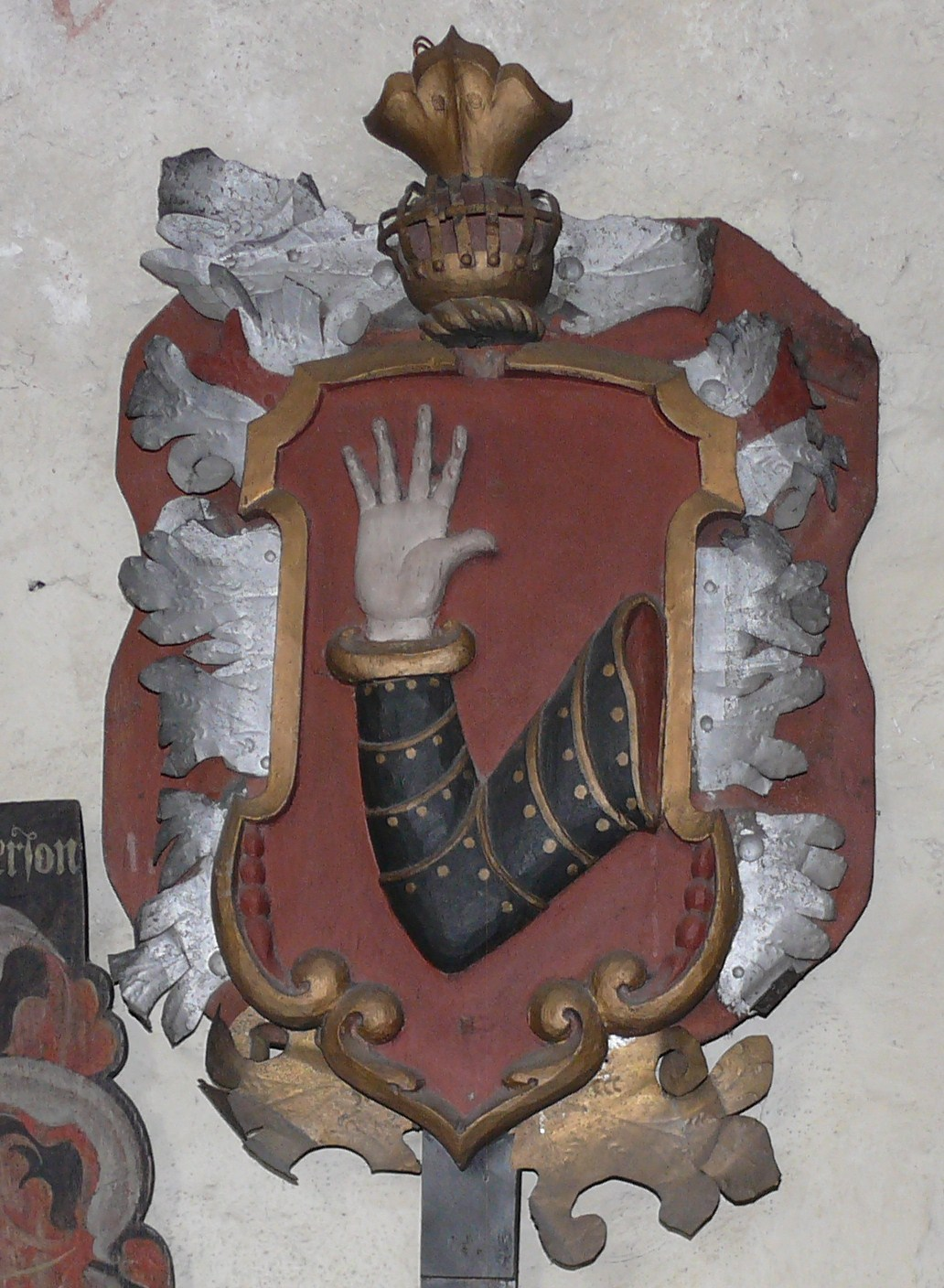 Stålarm (nr 32), vapensköld i Sankta Katarina kyrka i Karis, Finland